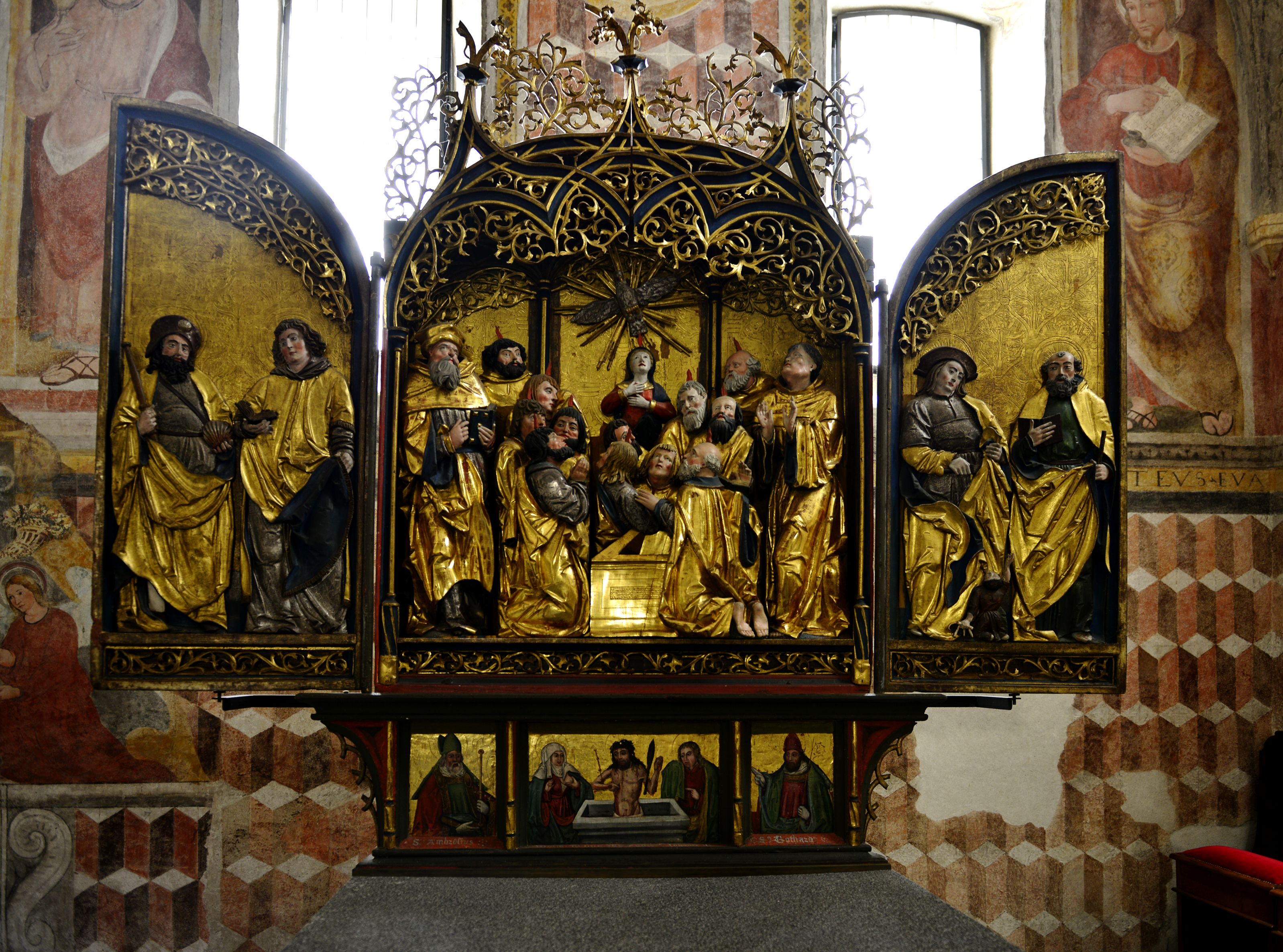 Chiesa di S.Maria Assunta